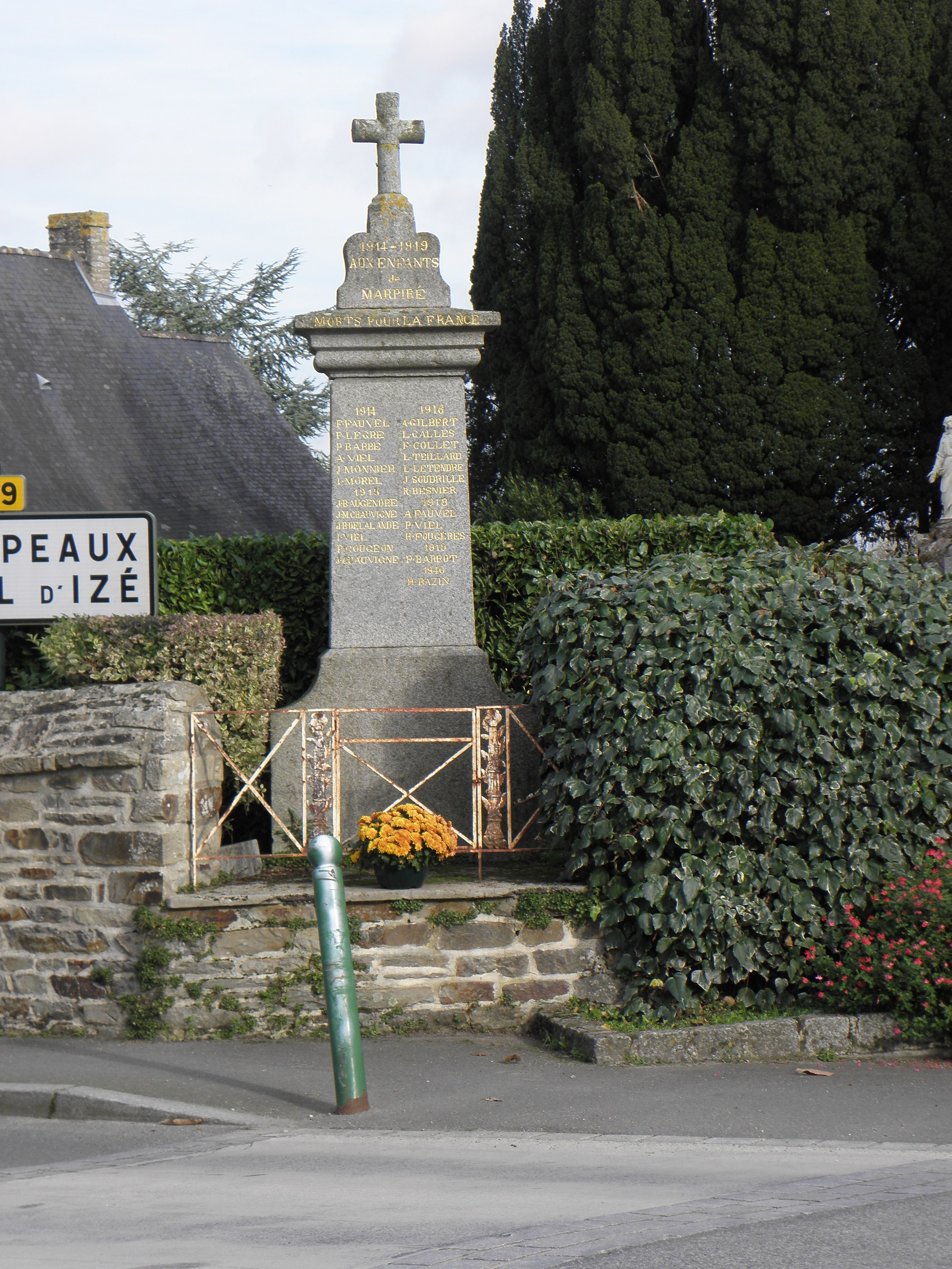 Monument aux morts de Marpiré (35).